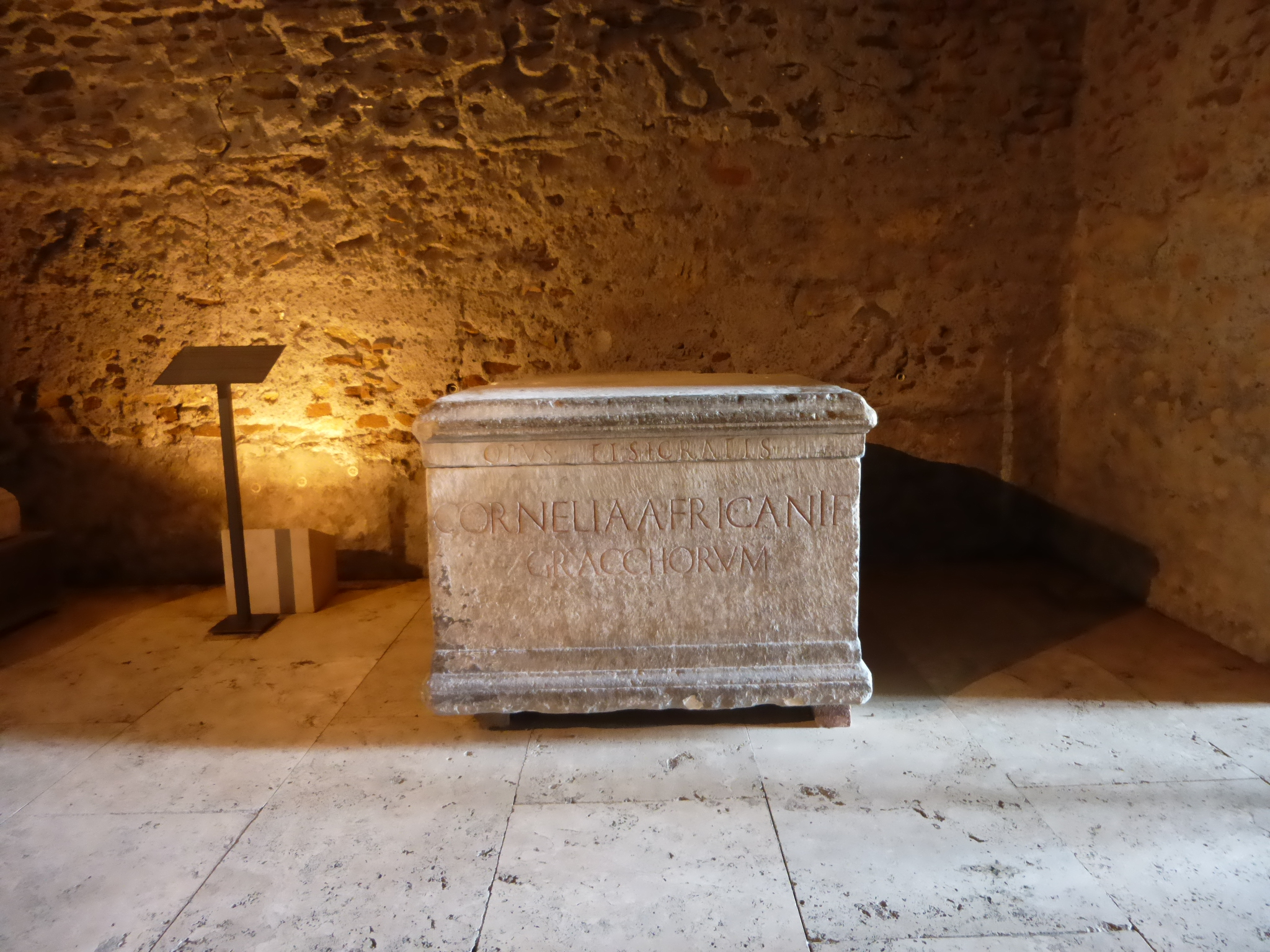 Roma, Tabularium. Piedistallo della statua di Cornelia Africana, madre dei Gracchi. La base fu trovata nel 1878 nei pressi della chiesa di S. Angelo in Pescheria. Tenuto conto dell'iscrizione superiore (ma più recente) è possibile che sia stata utilizzata per due opere diverse, e che l'iscrizione inferiore (più antica) sia quella relativa alla statua citata da Plinio e Plutarco (cfr. Enciclopedia Arte Antica Treccani). CIL VI 10043 = CIL VI 31610 = InscrIt. 13-3, 72 = AE 2004, 196 = AE 2014, 577: Opus Tisicratis // Cornelia Africani f(ilia) / Gracchorum